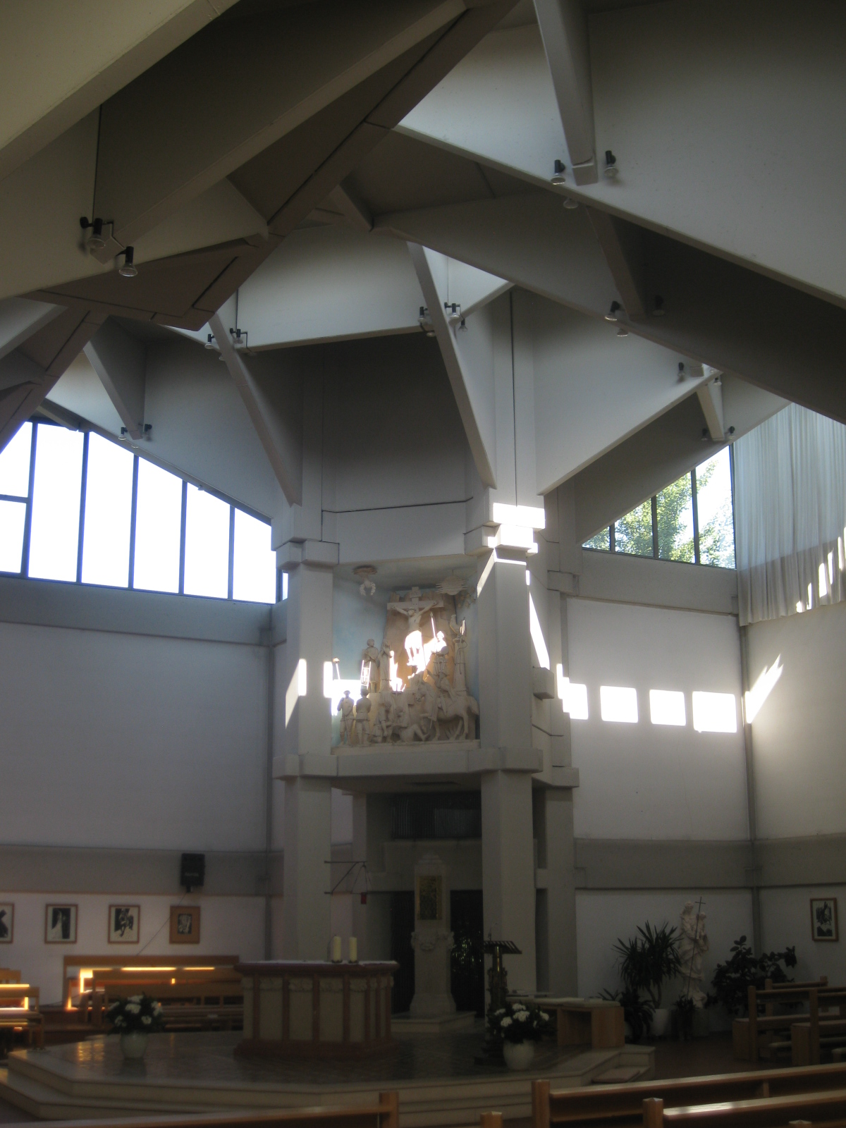 Kath.Kirche mit Gemeindezentrum (Architekt Dieter Georg Baumewerd, 1969)